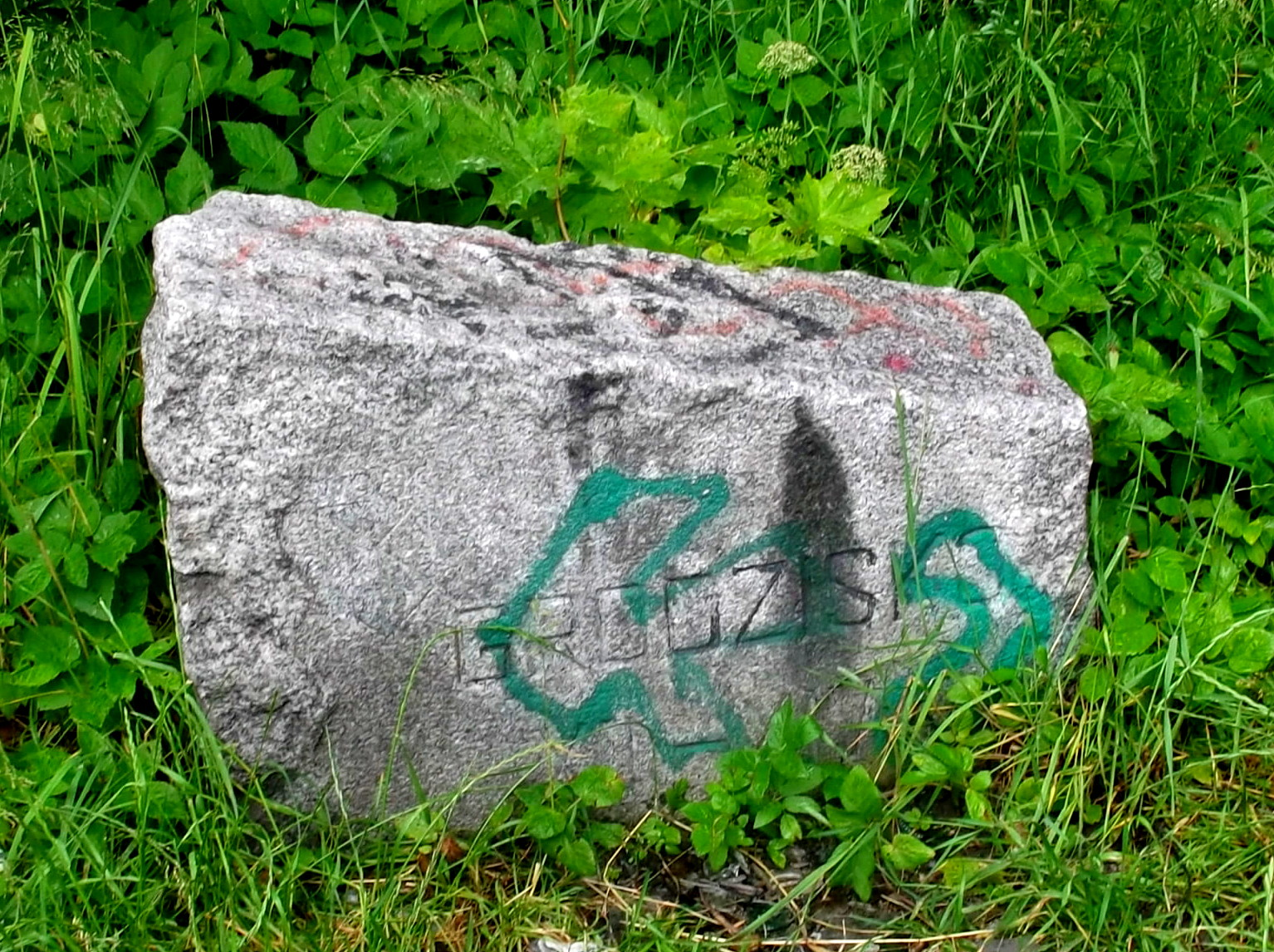 Kamienna Góra, Grodzisko